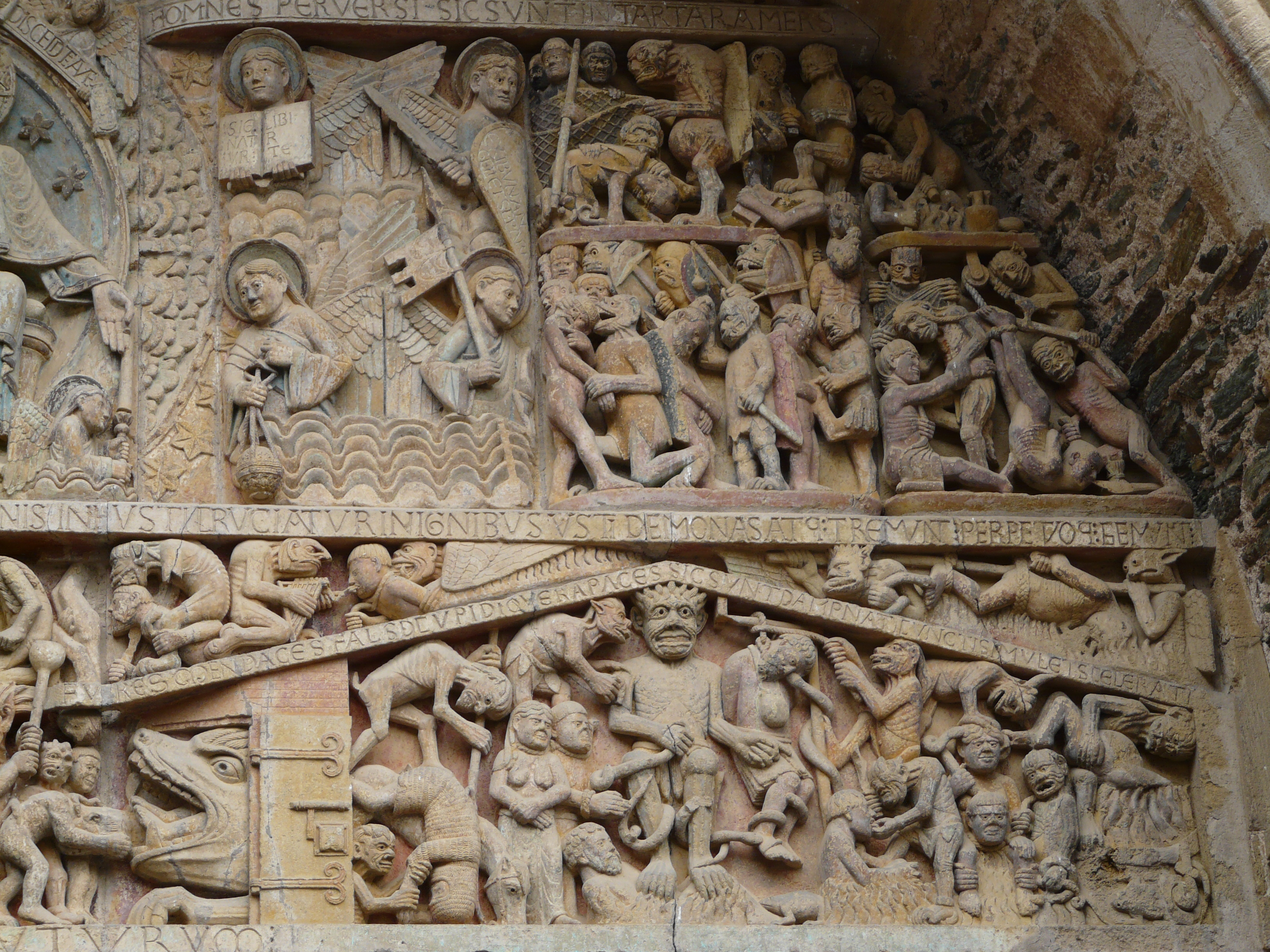 Le tympan de l'Abbatiale Sainte-Foy de Conques (France - Aveyron) représentant le jugement dernier. Détails partie droite. .